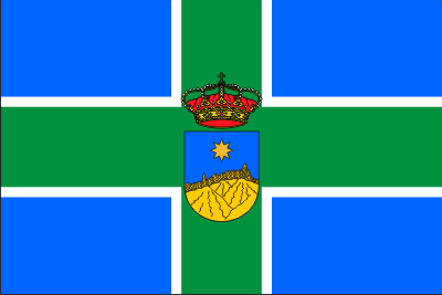 Bandera de Tejeda (Las Palmas, España)